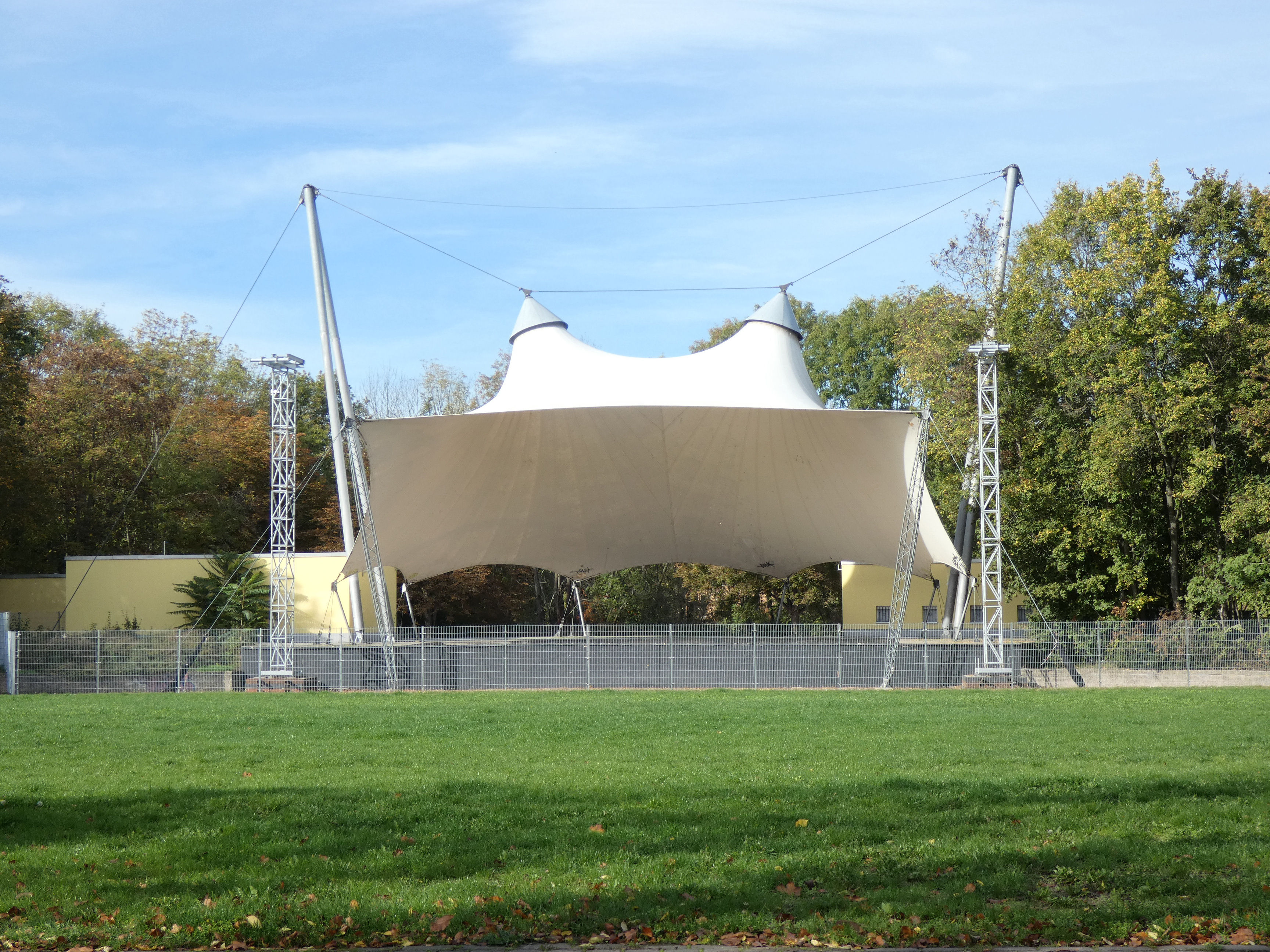 Peißnitzinsel Halle (Saale), Freilichtbühne